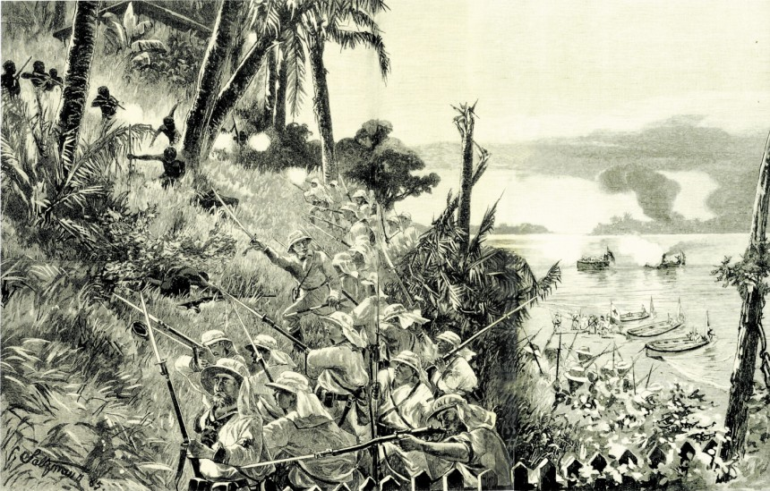 "Aus unseren Kolonien: Die Erstürmung von Belltown in Camerun durch die Landungsabteilung der deutschen Corvette Olga."(Originalbeschreibung)